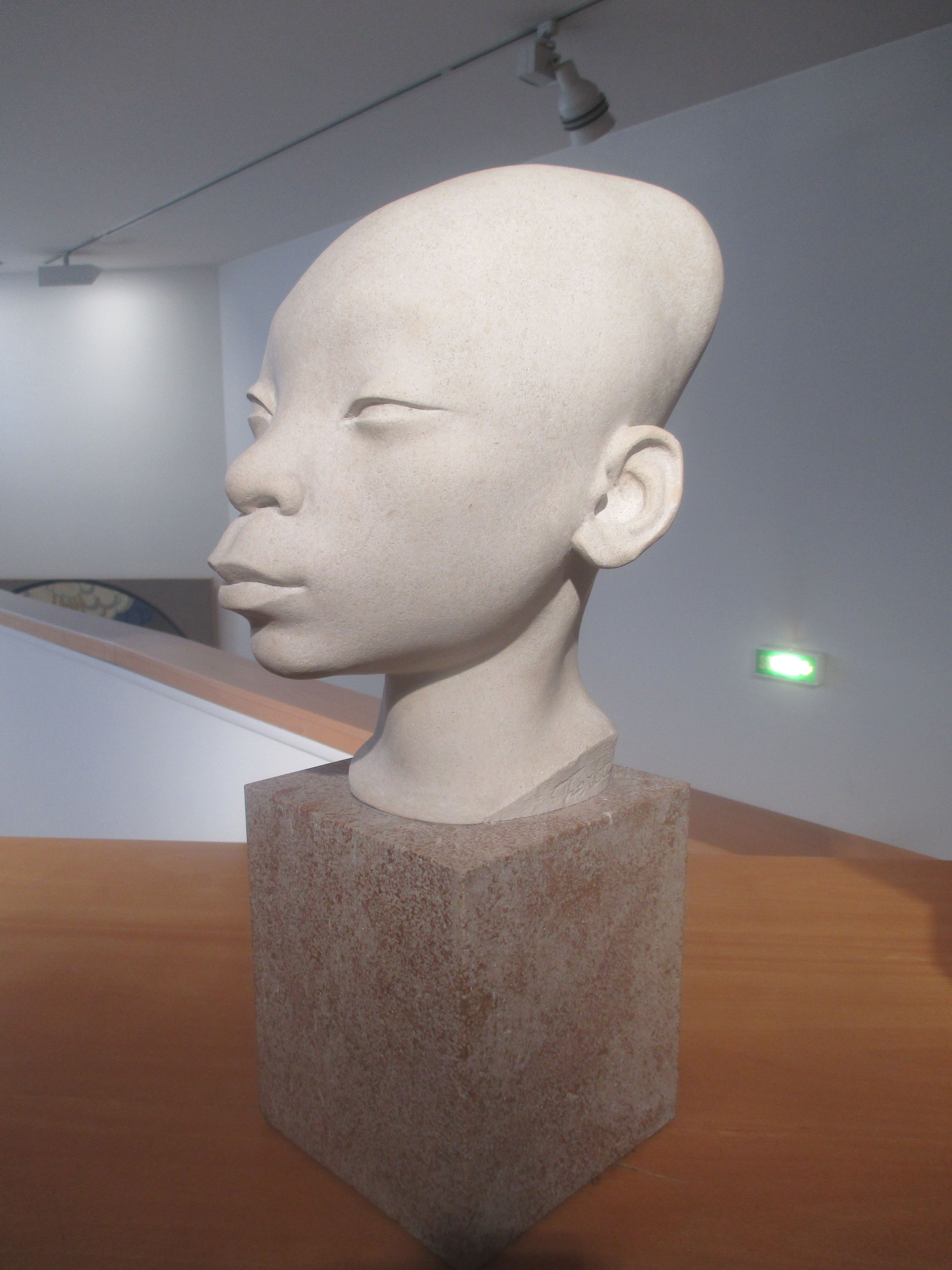 Tête de jeune Africaine du territoire Mangbétu. Par Jeanne Tercafs (1898-1944), au musée des Années 1930. Dépôt du musée du quai Branly 1992.